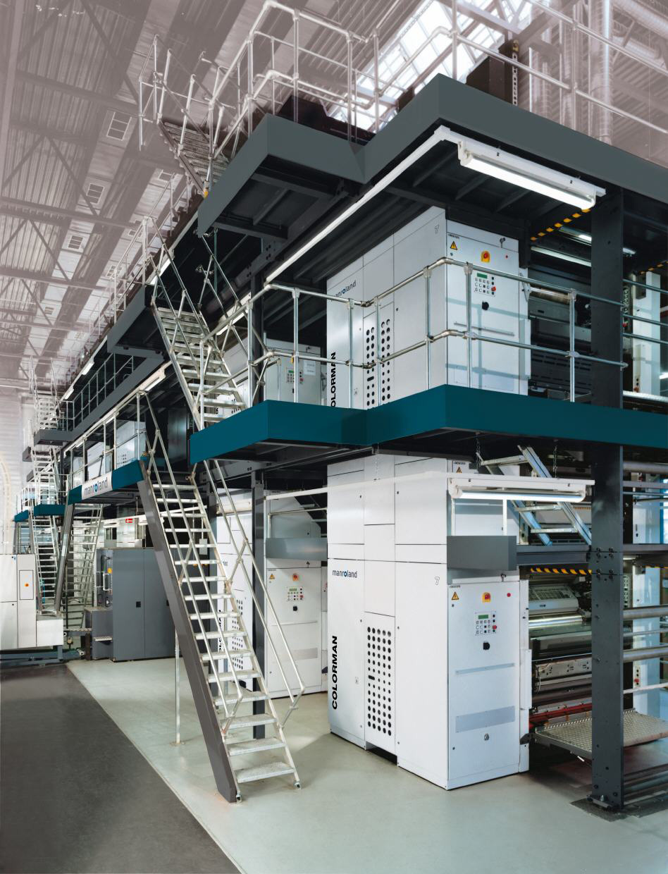 manroland Druckmaschine für den Rollenoffset- und Zeitungsdruck